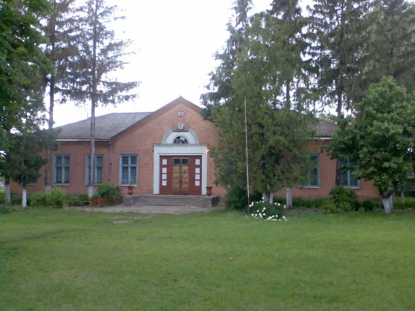 Школа